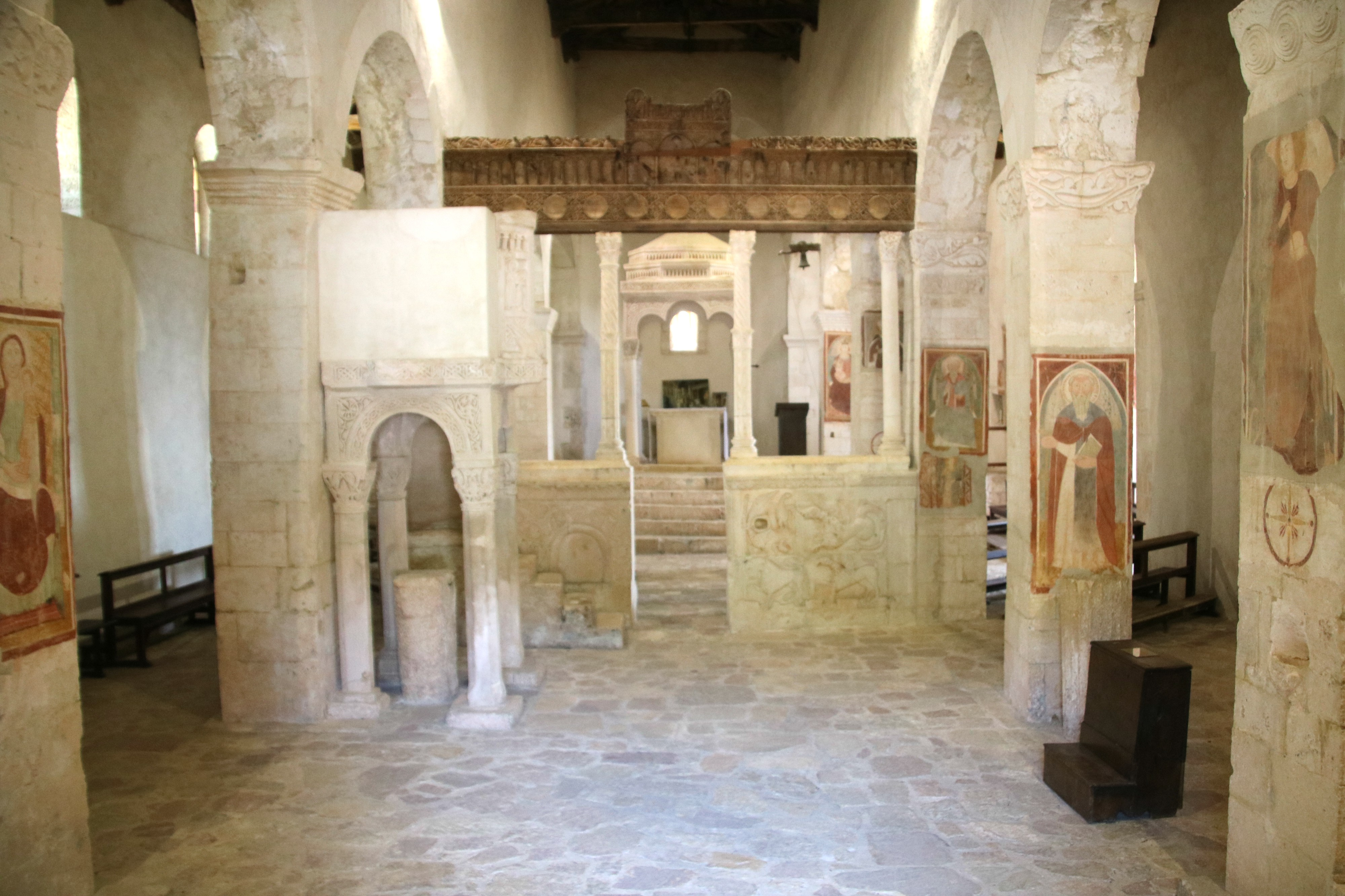 Chiesa di Santa Maria in Valle Porclaneta (Rosciolo dei Marsi)